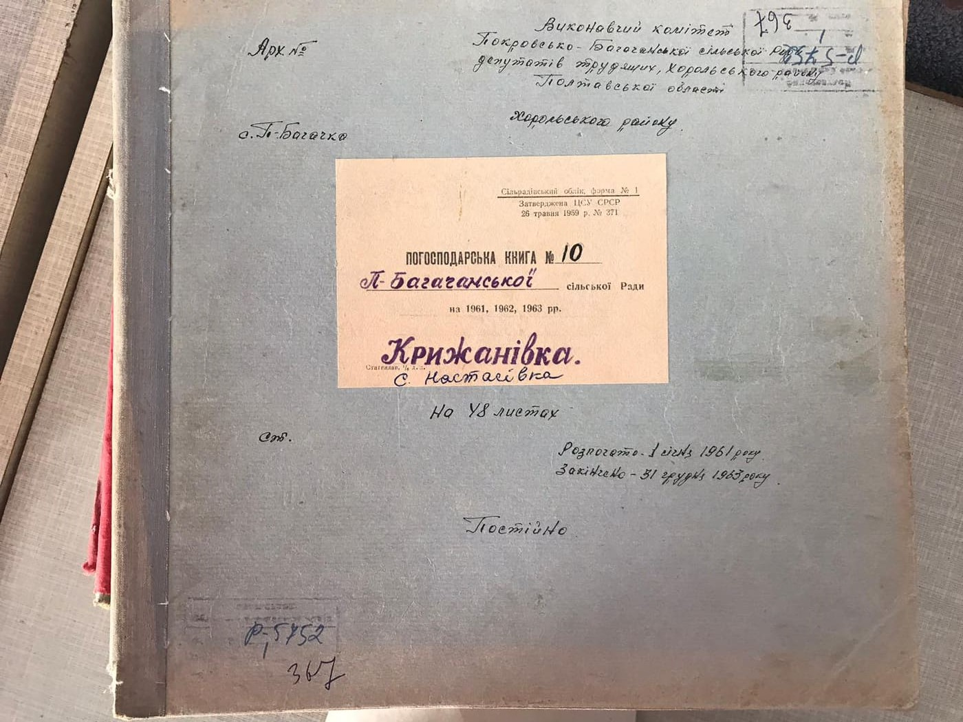 Фото: Погосподарська книга № 10 П.-Багачанської сільської ради